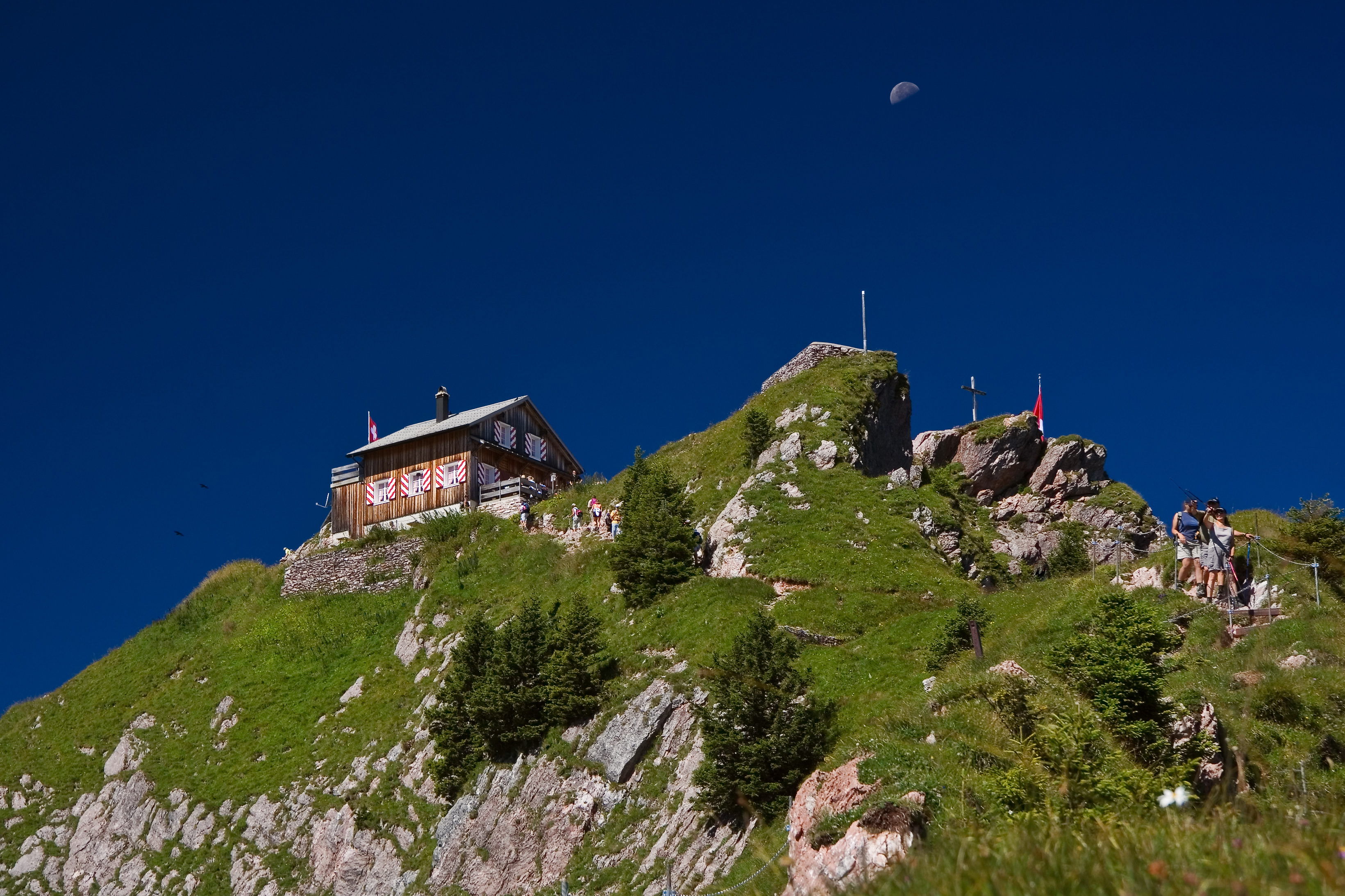 Der Gipfel des Grossen Mythen in Schwyz. Links das Bergrestaurant, rechts das Gipfelkreuz.